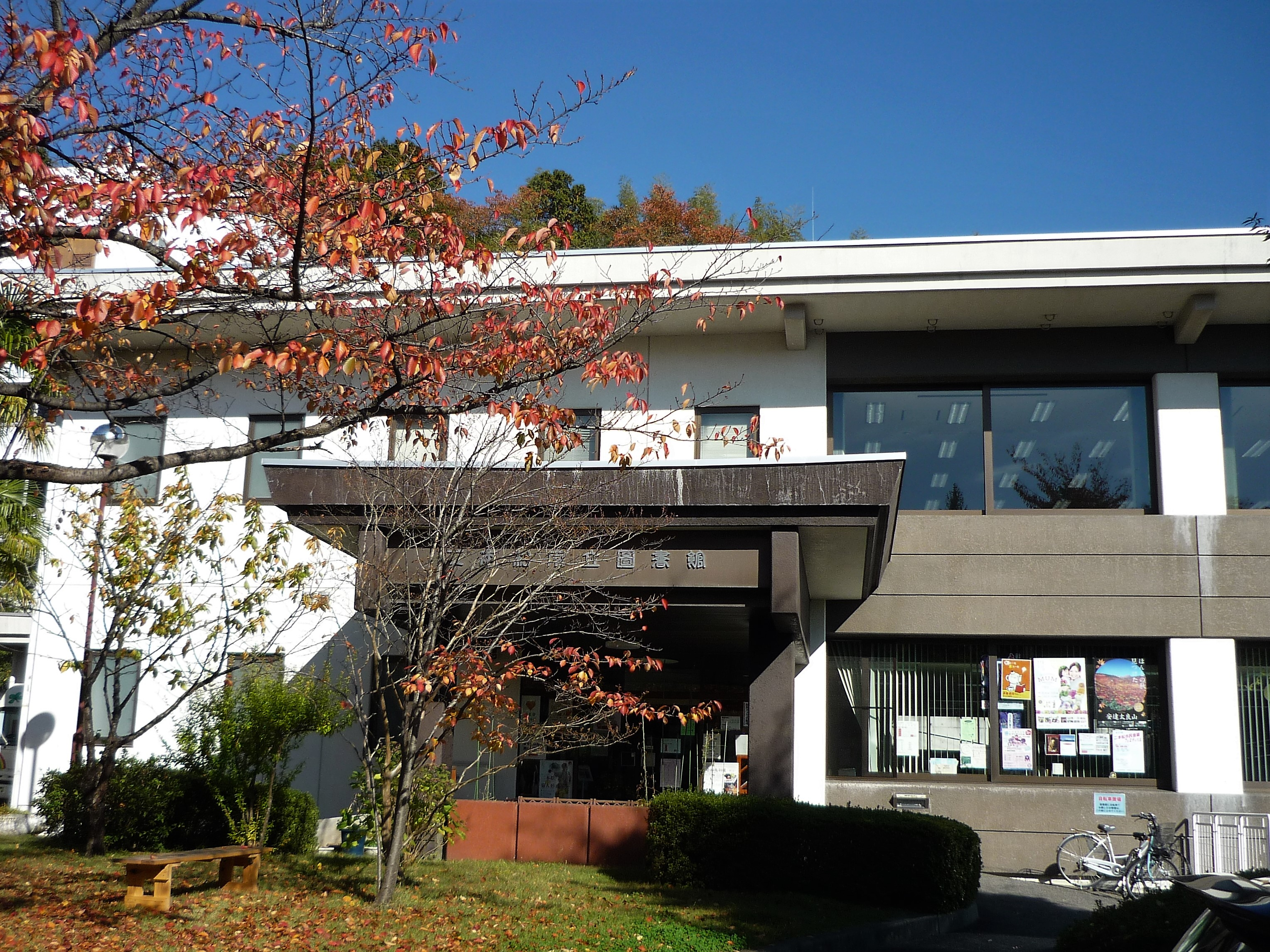 二本松市立二本松図書館 Panasonic Lumix DMC-FS3